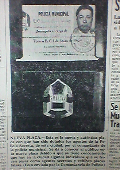 Nueva placa del Servicio Secreto de la Policía Municipal de Tijuana en 1963. La imagen fue distribuida a la prensa por el Comandante de la Policía Municipal de Tijuana, Mayor Raúl Pérez Arceo, en julio de 1963. Foto tomada a la primera plana de un ejemplar del periódico "El Heraldo Baja California" de fecha 22 de julio de 1963, en el cual se muestra la imagen proporcionada por la Comandancia de la Policía Municipal y un pie de página. El ejemplar del periódico está disponible en la hemeroteca del Archivo Histórico de Tijuana, con domicilio en calle Segunda esquina con Av. Constitución en Tijuana, B.C.